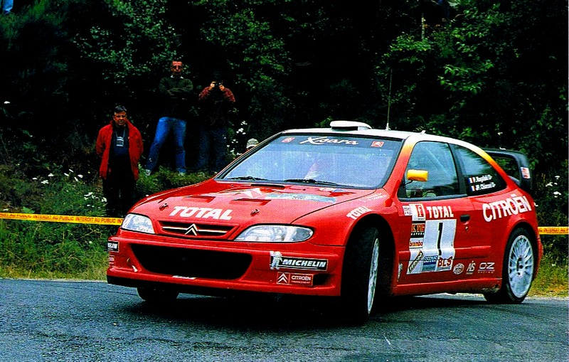 Vettura da Rally utilizzata da Citroen Sport nel campionato francese di specialità 2000 come test per la futura versione WRC